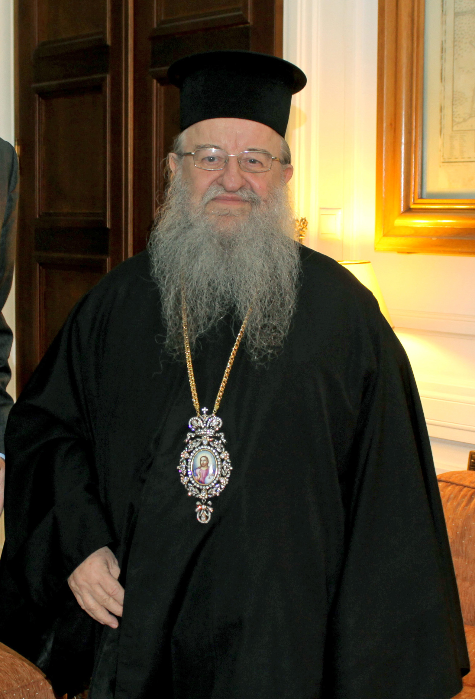 Συνάντηση ΥΠΕΞ Δ. Δρούτσα με Σεβασμιότατο Μητροπολίτη Θεσσαλονίκης κ. Άνθιμο (ΥΠΕΞ, 02.03.11) Foreign Minister Dimitris Droutsas meets with His Eminence Anthimos Metropolitan of Thessaloniki